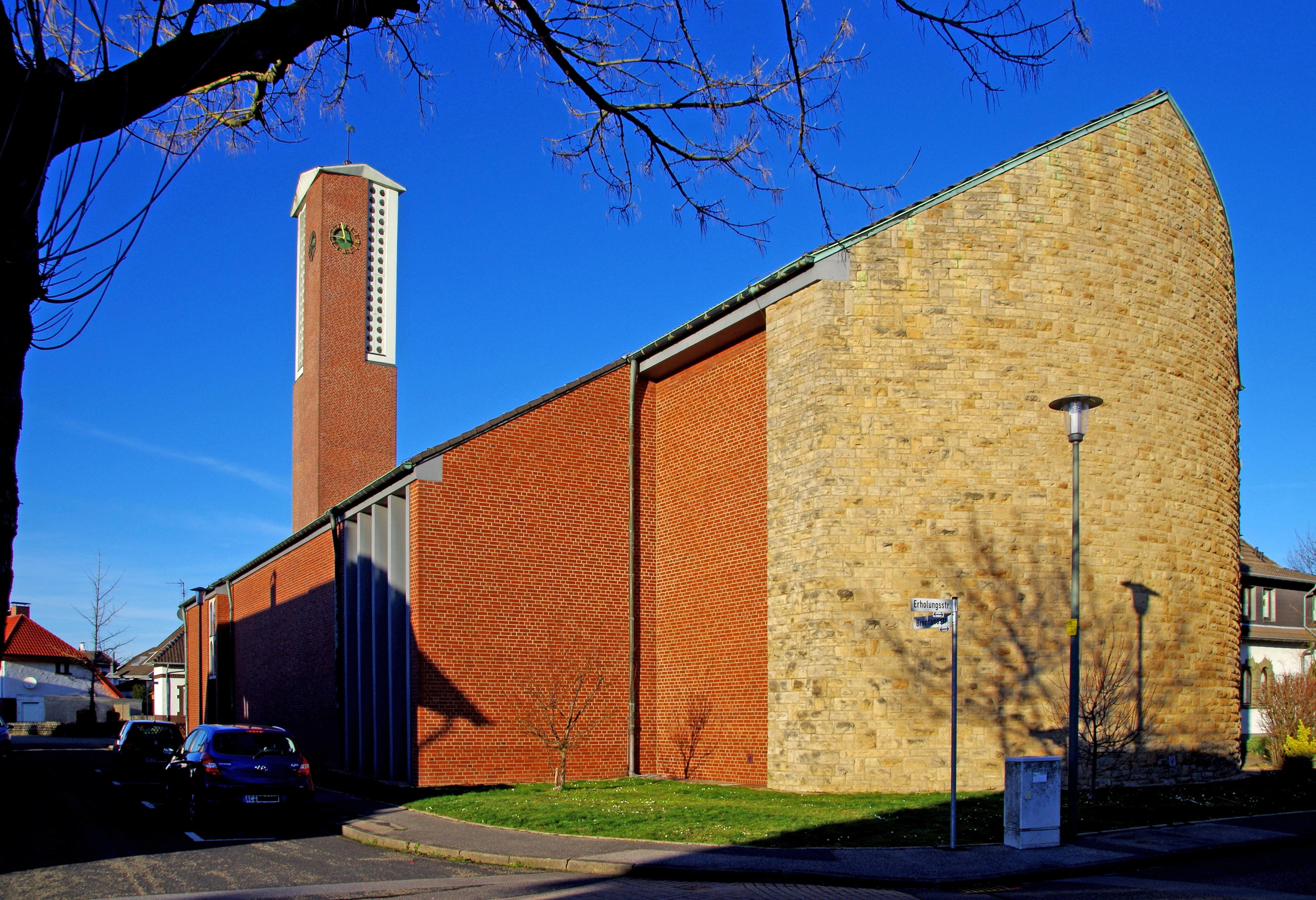 Herz Jesu (Kellersberg), Südwestseite